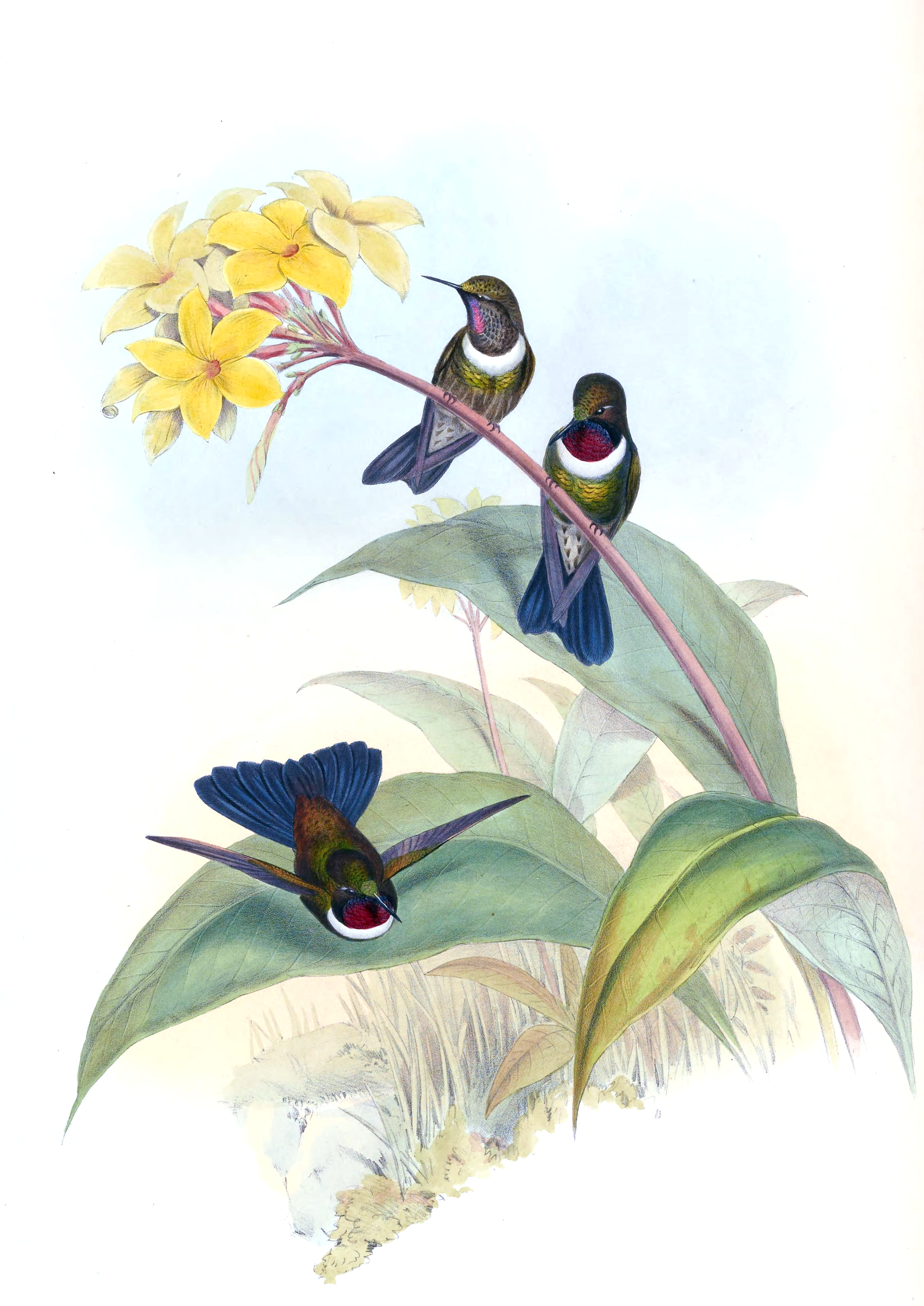 Heliangelus strophianus in John Gould's Hummingbirds ISBN 978-1555216610